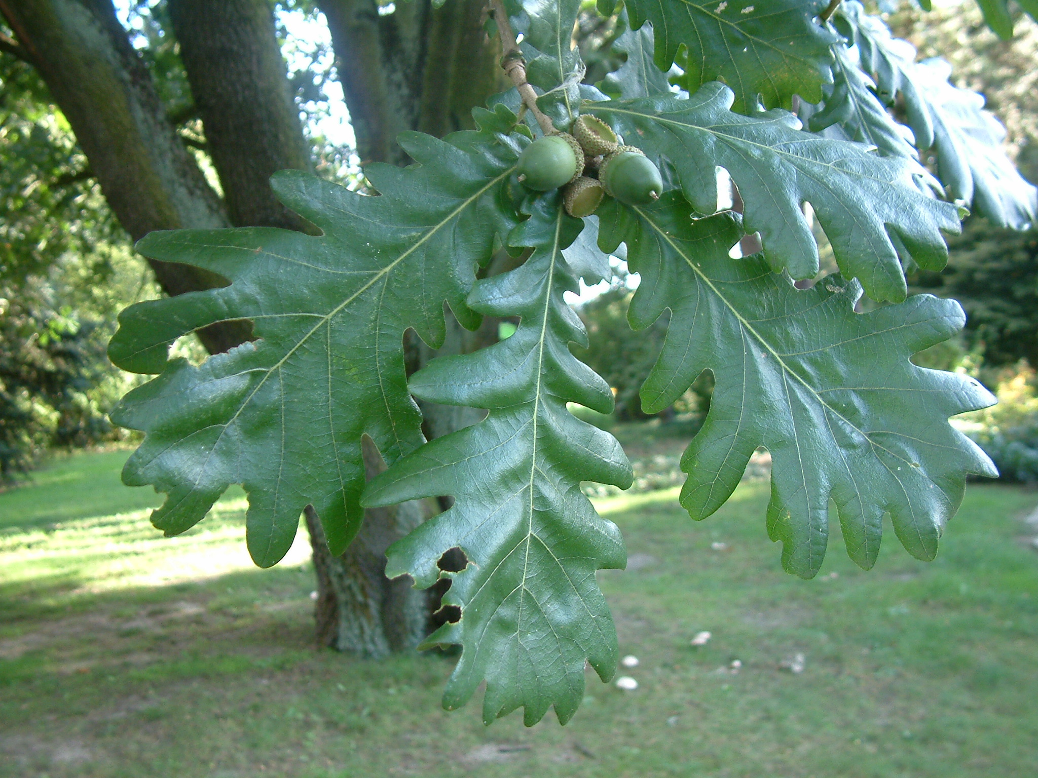 Quercus frainetto, Botanical Garden in Poznań